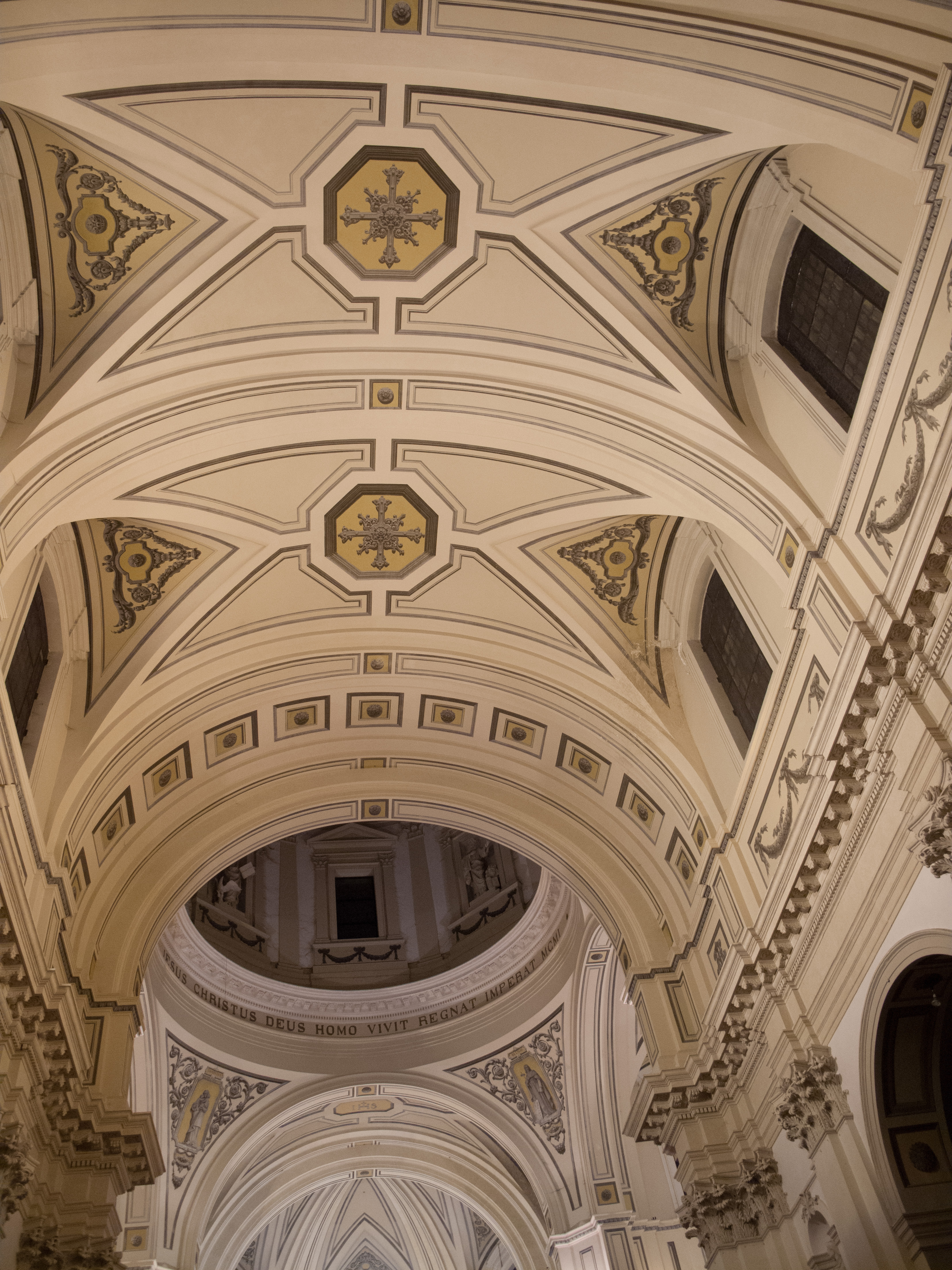 Vicenza - Chiesa di Santo Stefano - soffitto